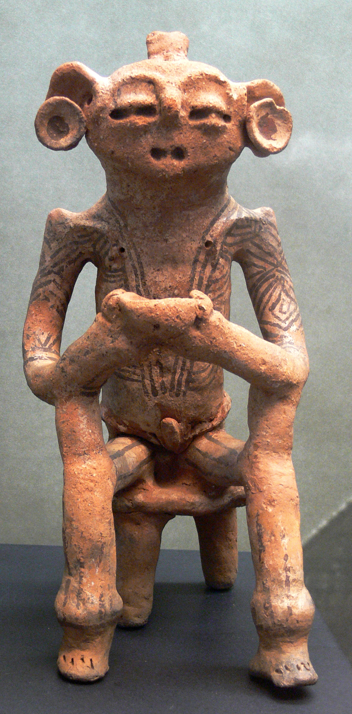 Schaffhausen, Museum zu Allerheiligen, Sammlung Ebnöther, (Abteilung "Idole") Opfernder, Keramik, schwarz bemalt, Höhe 28 cm, Venezuela, estado Trujillo, Timoto-Cuica-Kultur, um 500 n. Chr. (Katalog 1999; S. 59)